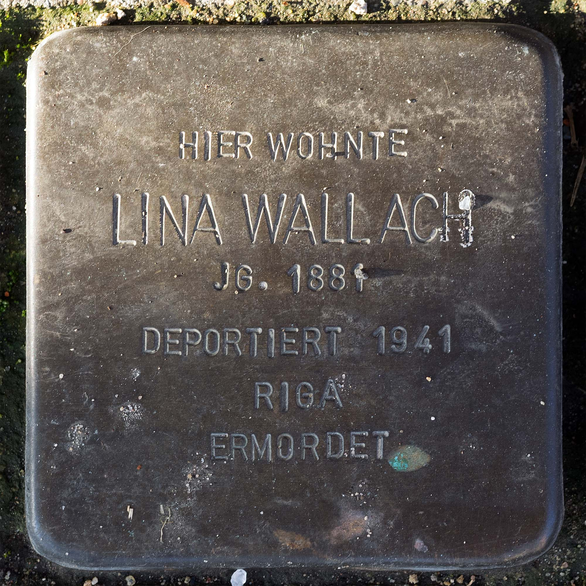 Stolperstein für Wallach Lina